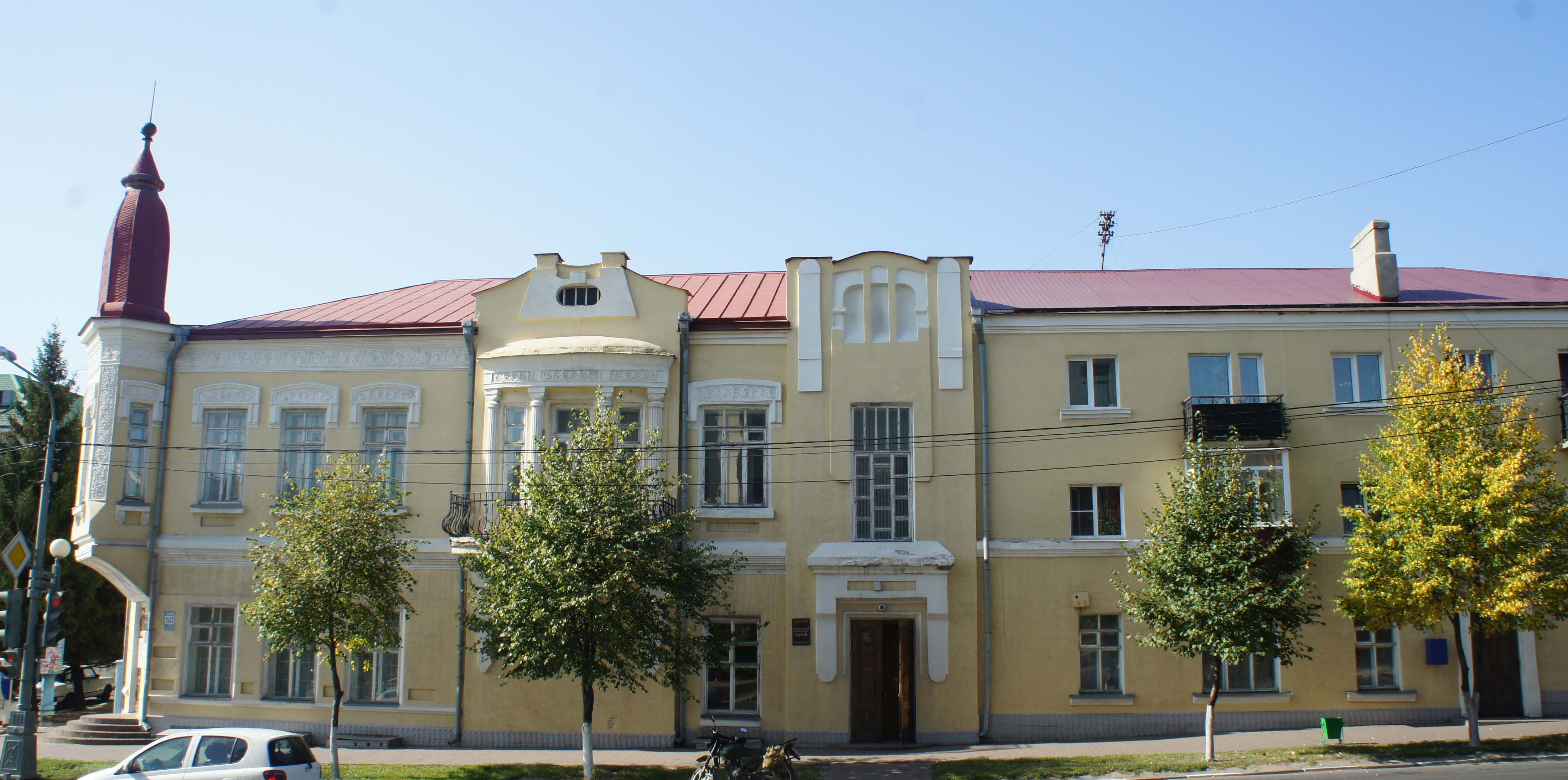 Здание, где состоялось первое заседание старооскольского уездного комитета РКСМ. Здесь размещался старооскольский комитет РКП(б) и городской совет рабочих депутатов: улица Ленина, 50/42, Старый Оскол, Белгородская область